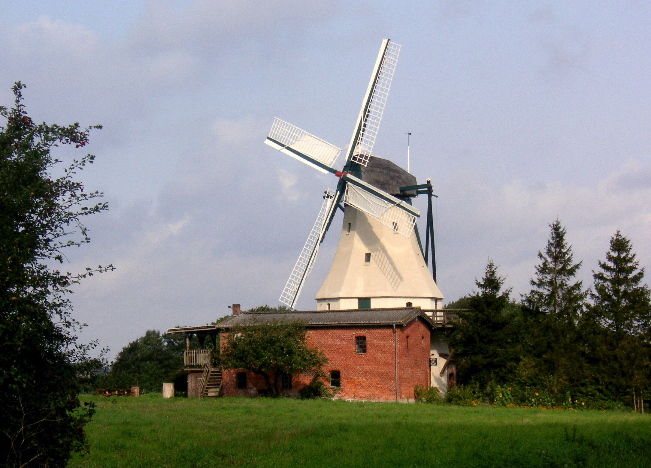 Die Holländermühle in Unewatt im Jahr 2006